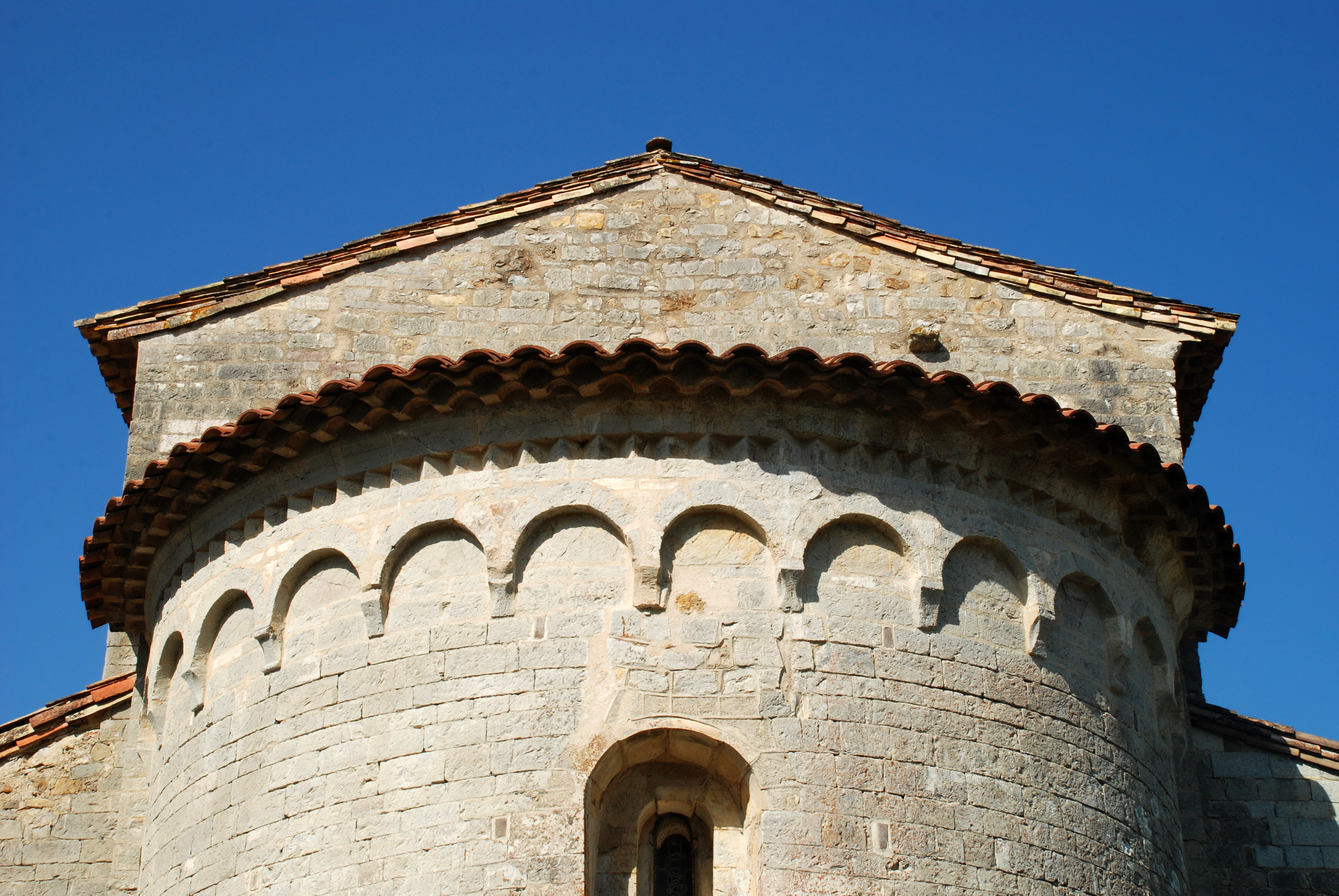 France - Gard - Église Saint-Baudile de Tornac